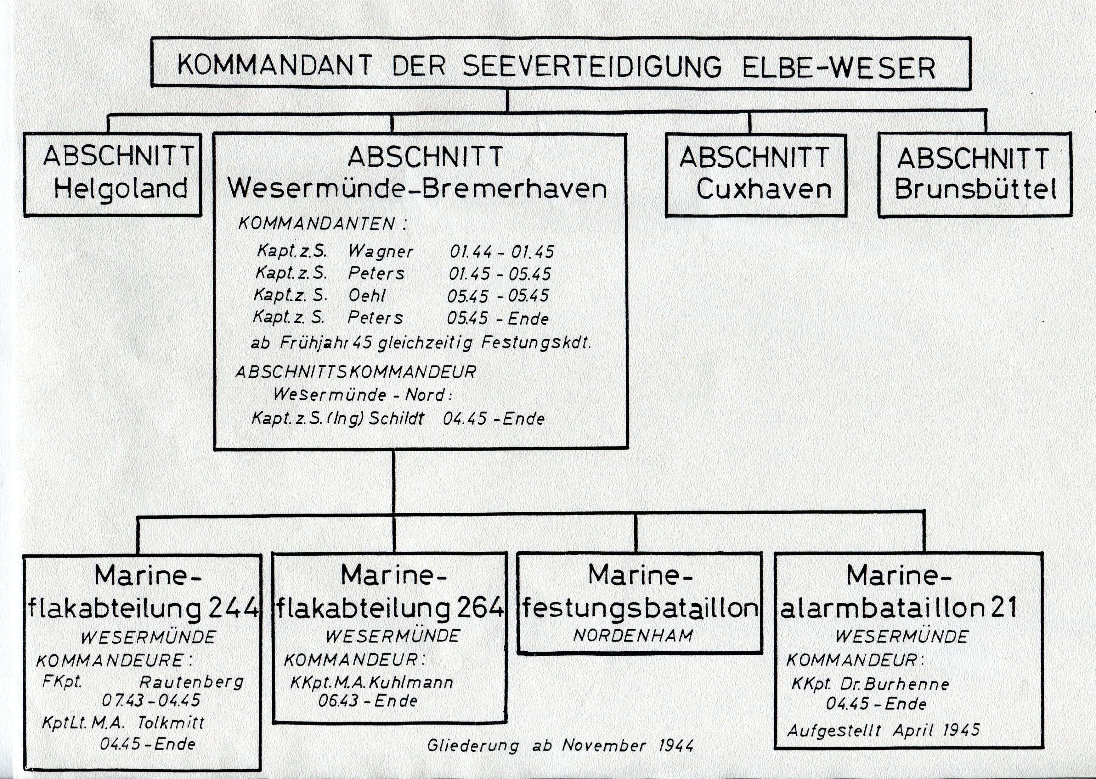 Gliederung des Befehlsbereichs Kommandant der Seeverteidigung Elbe–Weser.